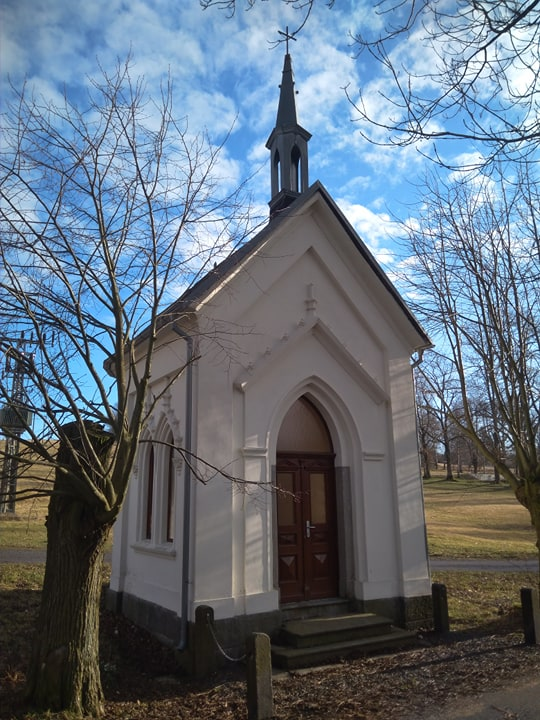 Kaple Andělů strážných v Mikulášovicích